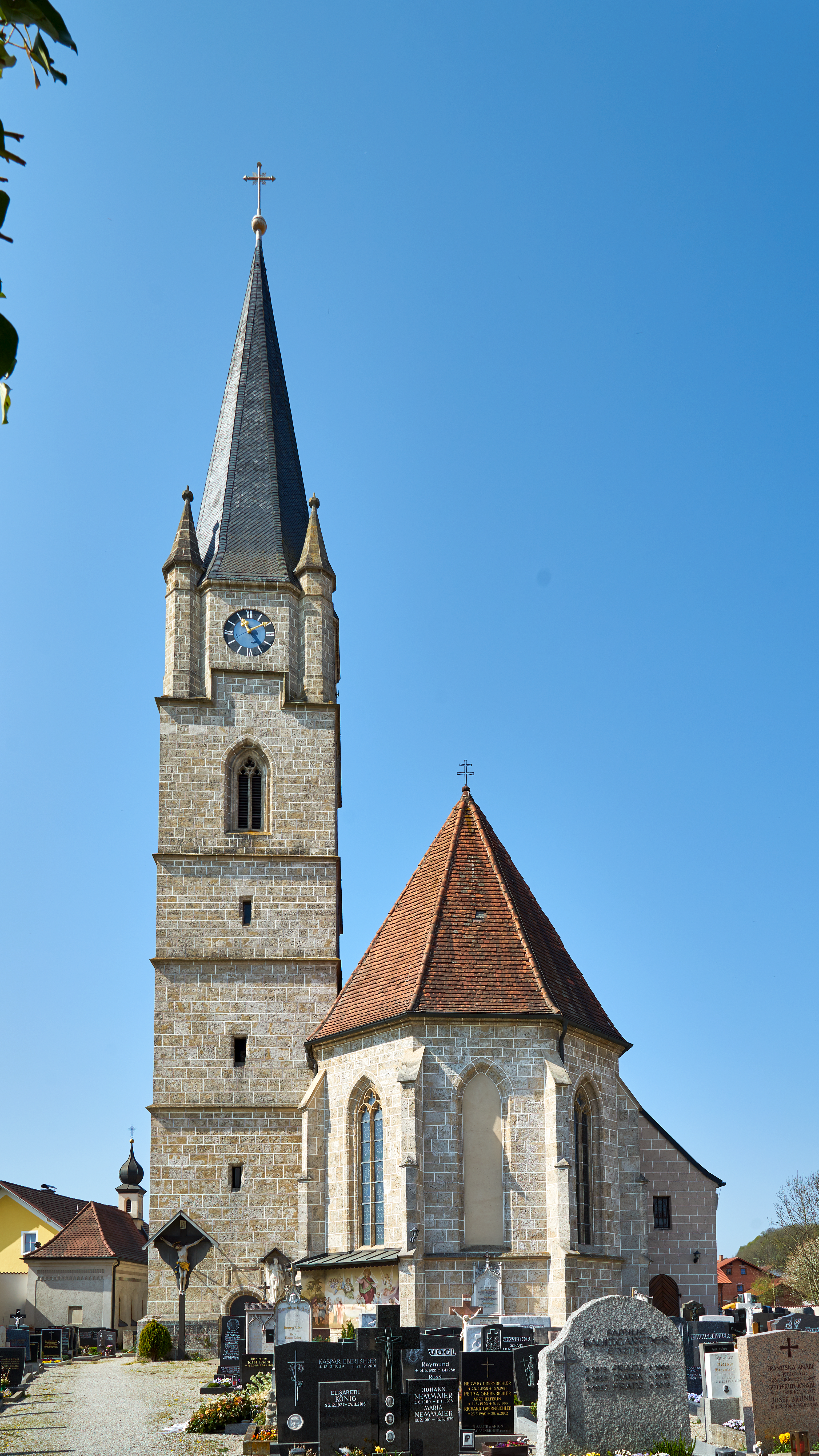 Katholische Pfarrkirche St. Aegidius Malching.Saalkirche mit Polygonalchor, Chorflankenturm, zweigeschossiger Sakristei und Vorzeichen, Chor 1456, Langhaus 15./16. Jahrhundert, Turm 1884-85 erhöht; mit Ausstattung. Ansicht von Nordosten mit Friedhof.